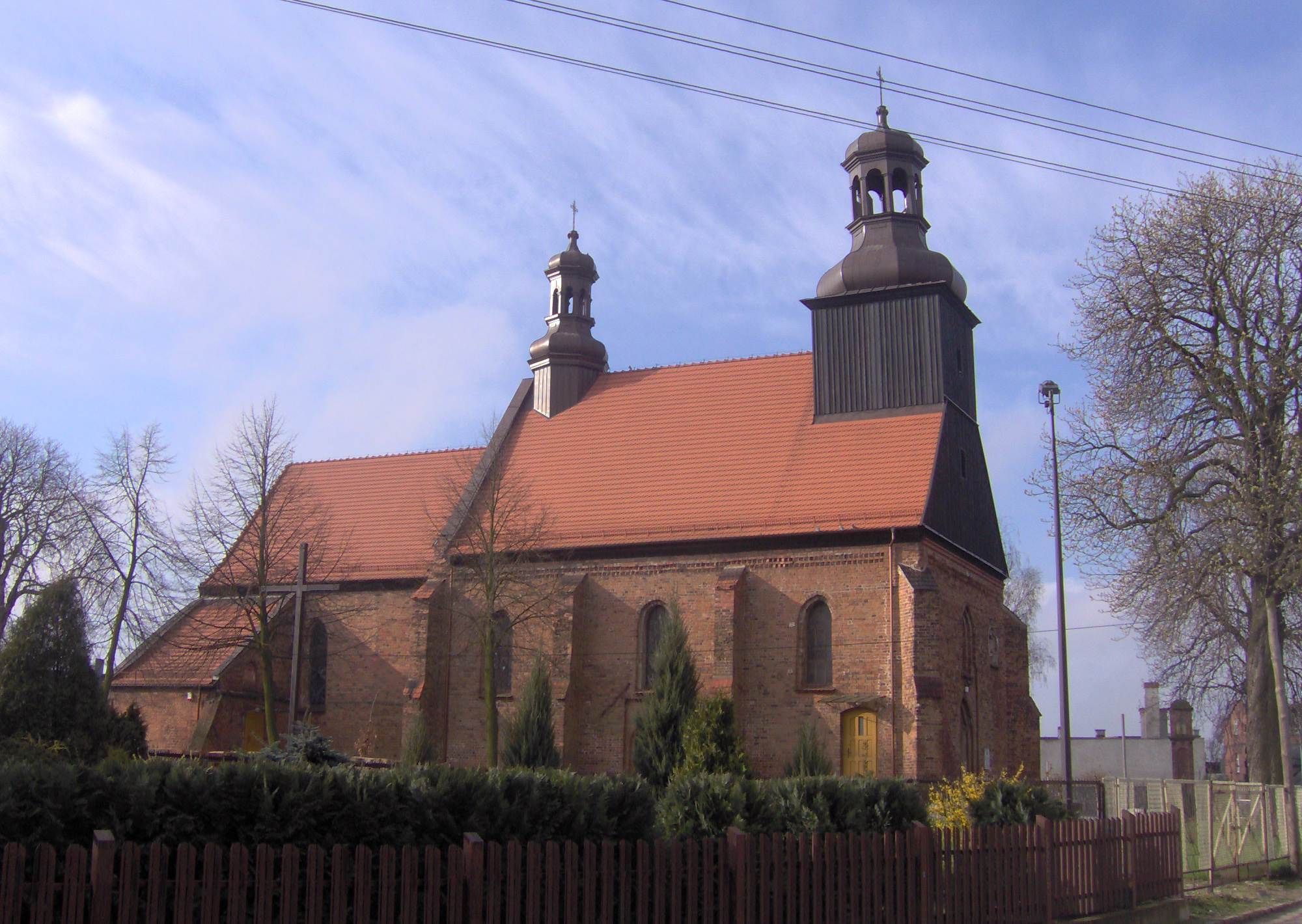 Kościół pw. św Mikołaja w Gniewkowie